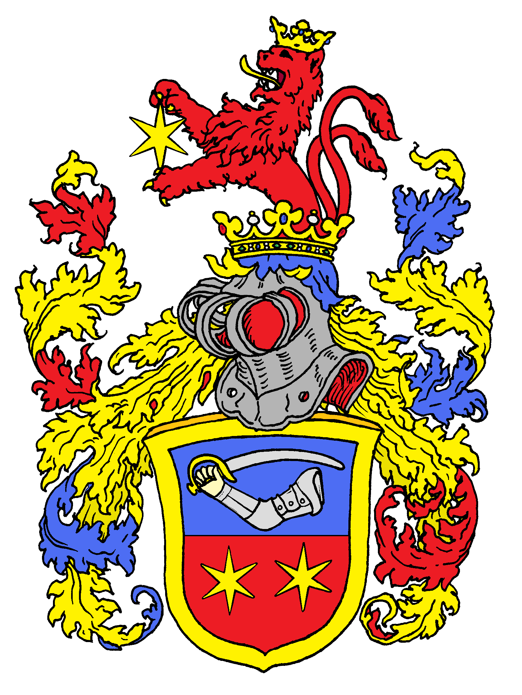 Wappen der von Fransecky (1776 preußische Bestätigung des alten ungarischen Adels, aber erstmals urkundlich belegt im 18. Jahrhundert in Ostpreußen)